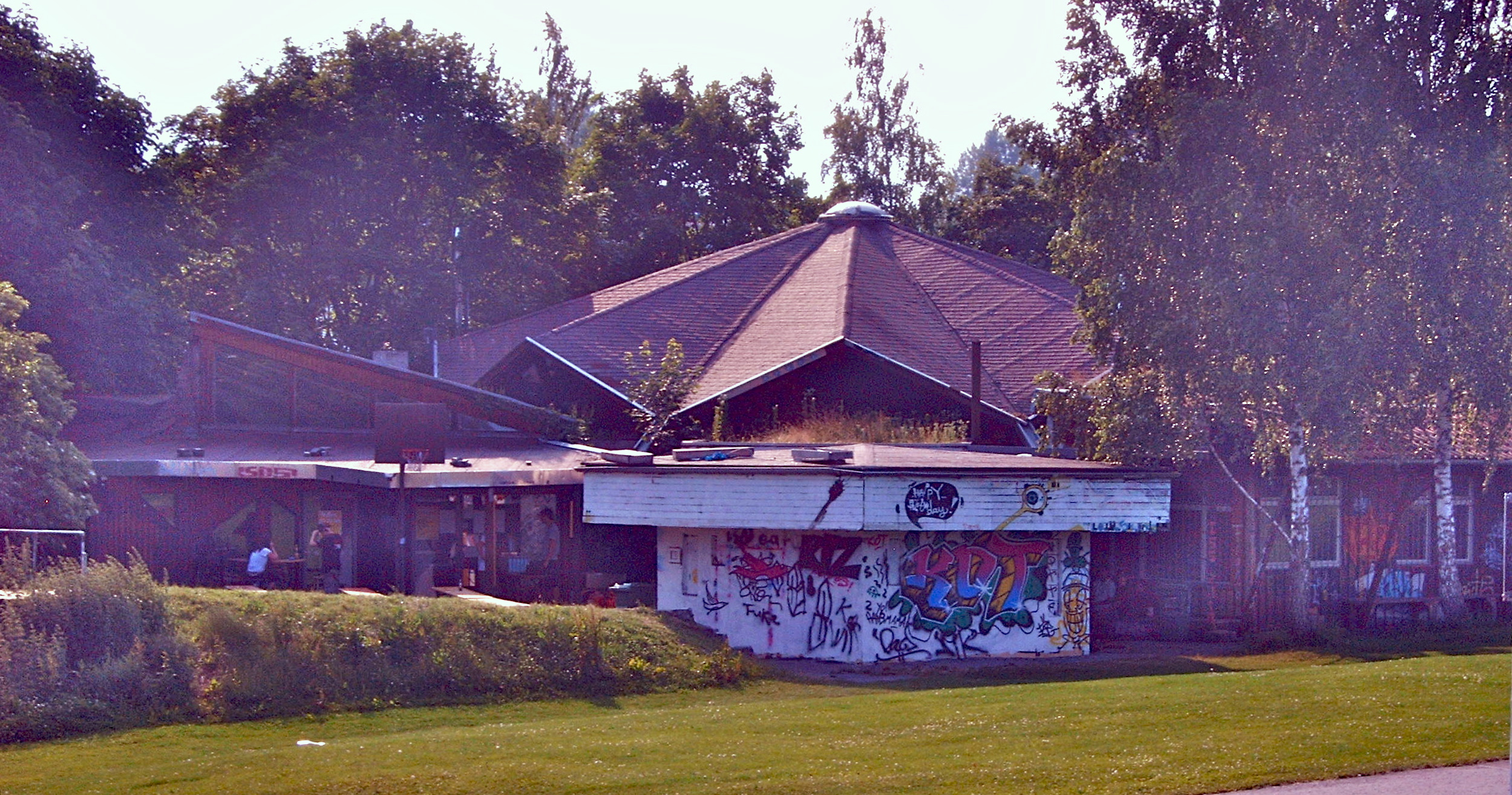 Jugendhaus Herrenberg